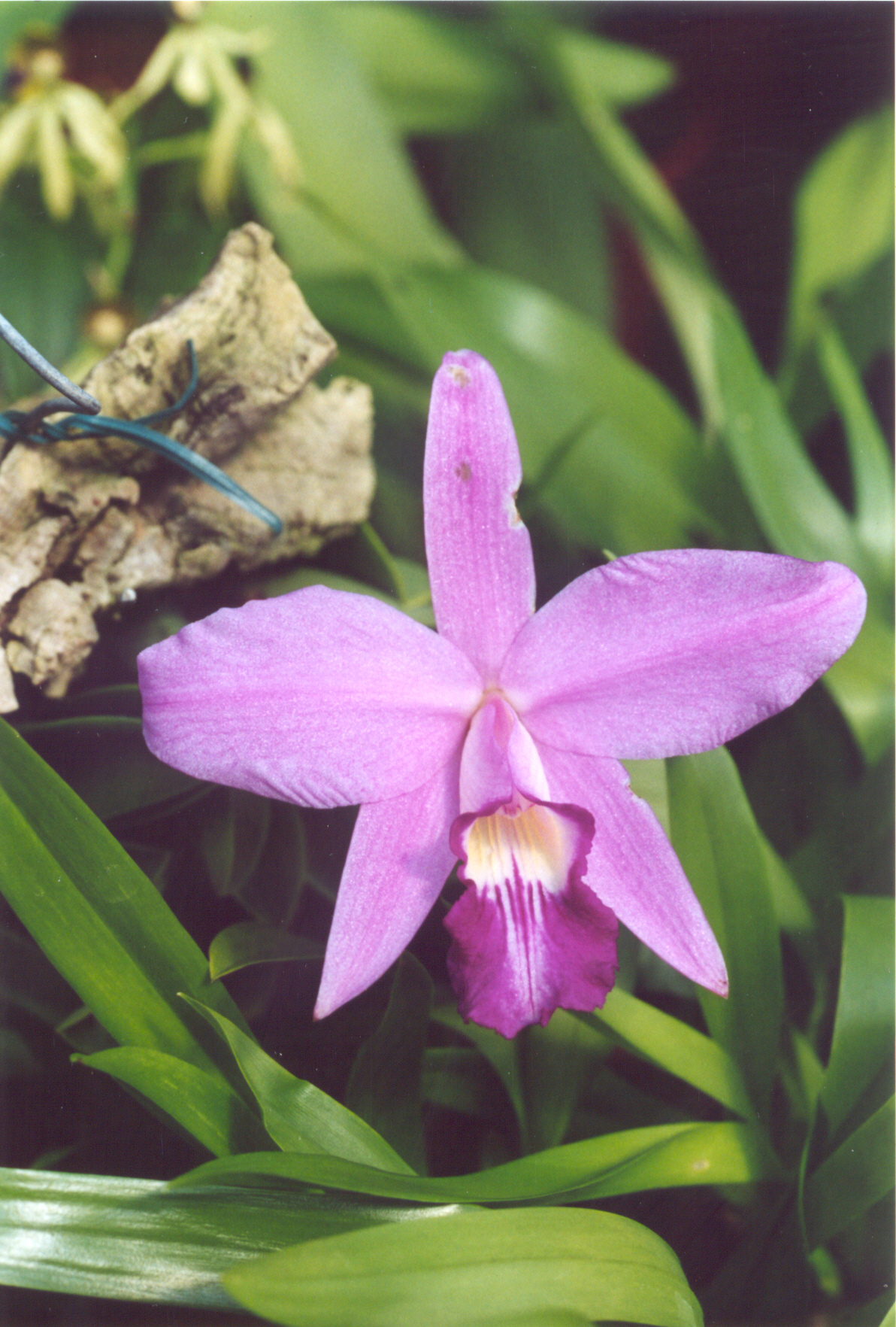 Laelia sincorana